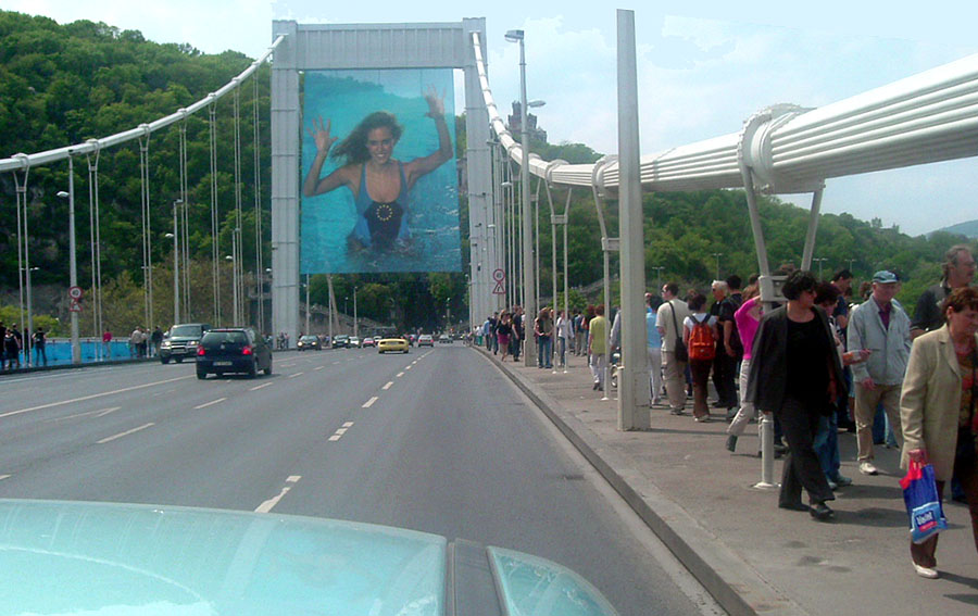 Az Erzsébet-híd az EU-belépés napján